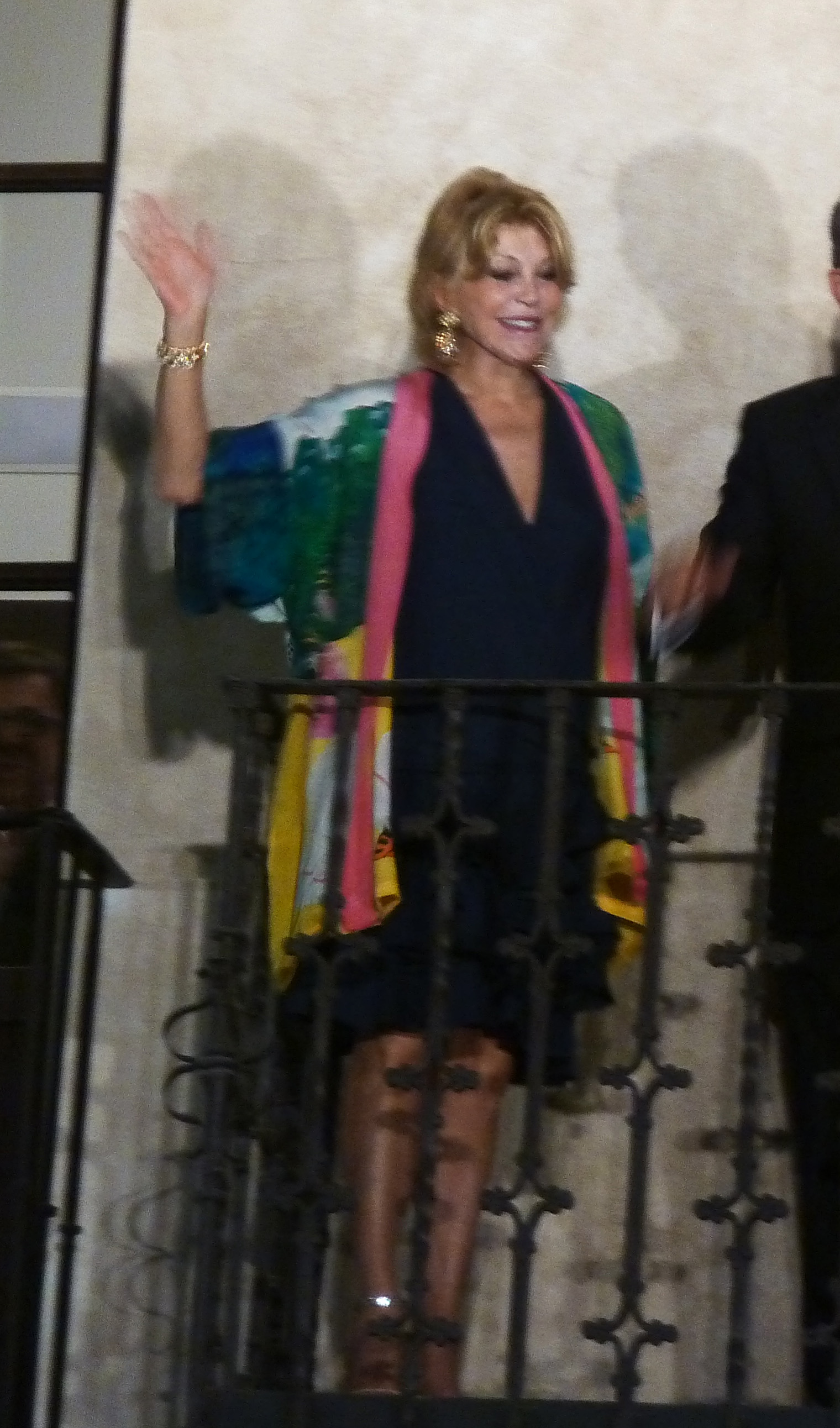 Acto inaugural del Museo con autoridades.